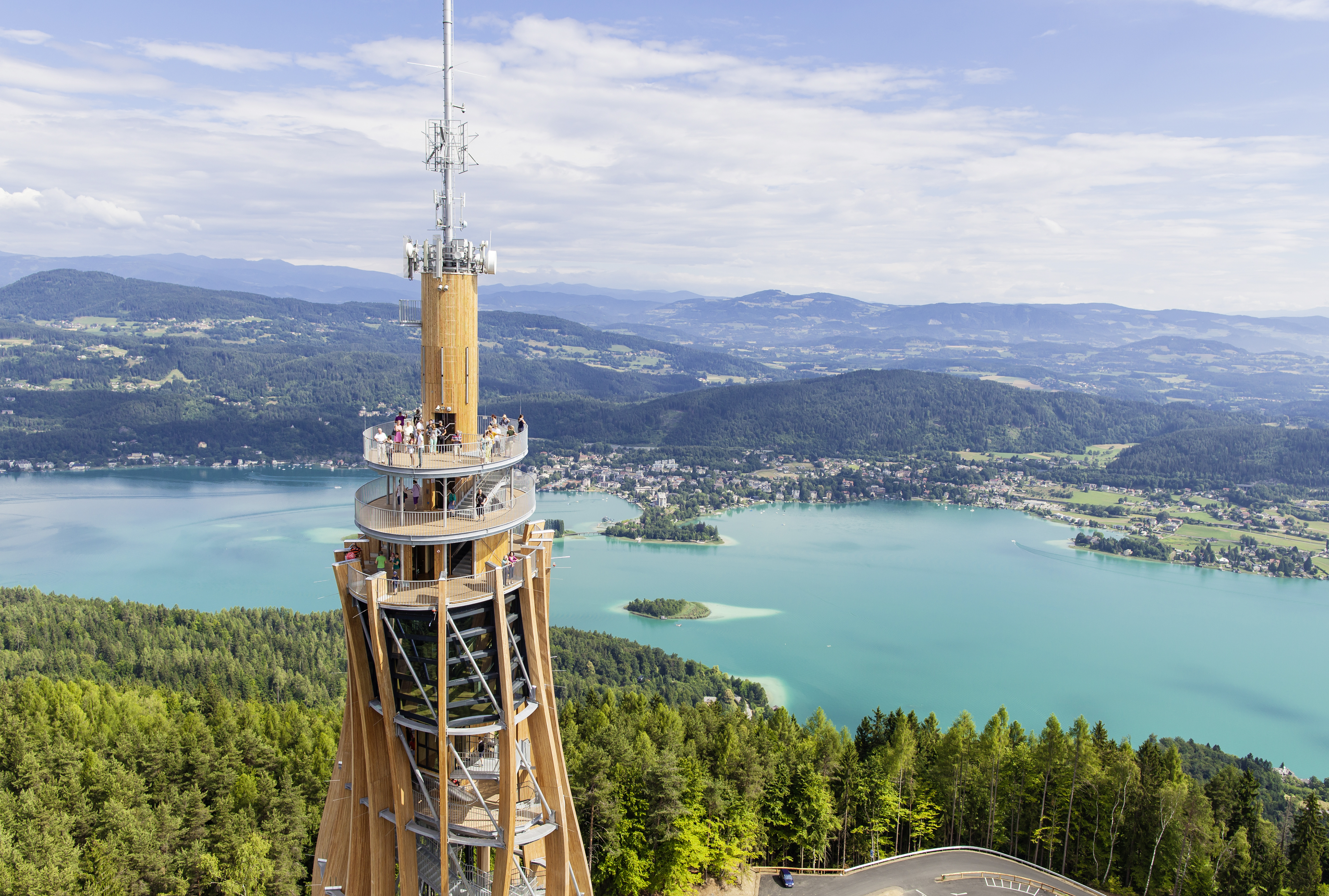 Aussichtsturm auf dem Pyramidenkogel